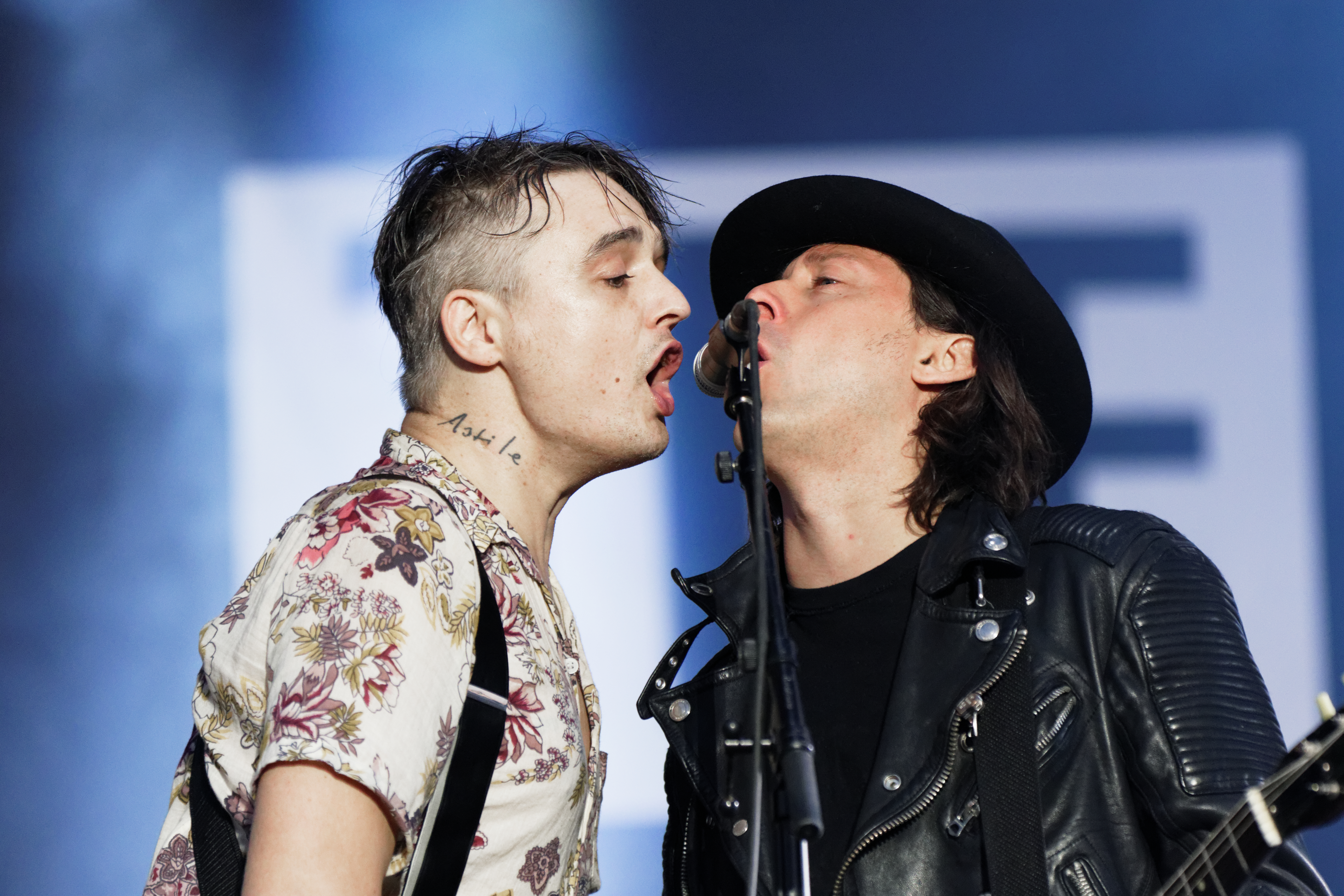 The Libertines en concert lors du festival des vieilles charrues 2016.